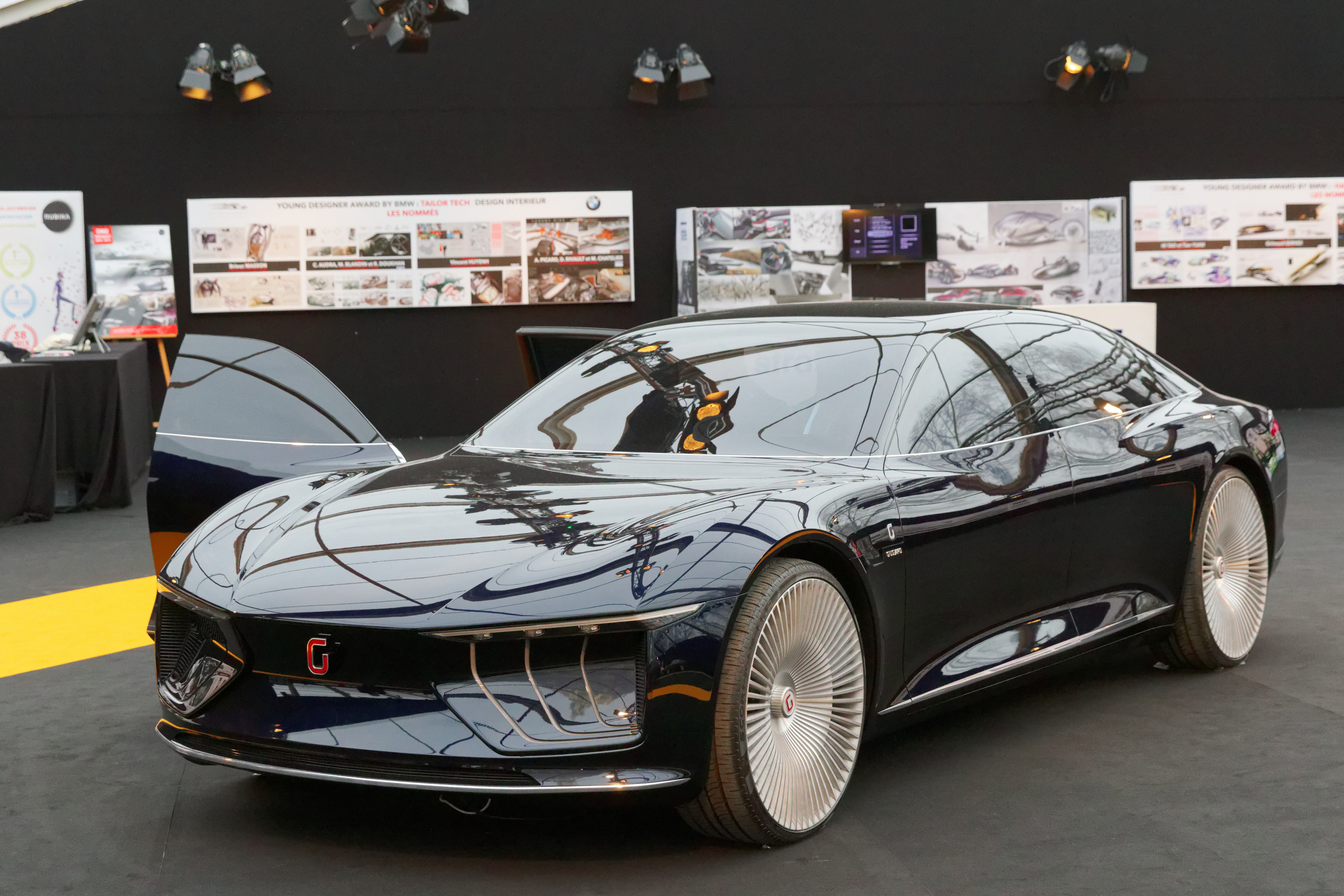 La Giugiaro GEA Concept exposée lors du festival automobile international 2016.